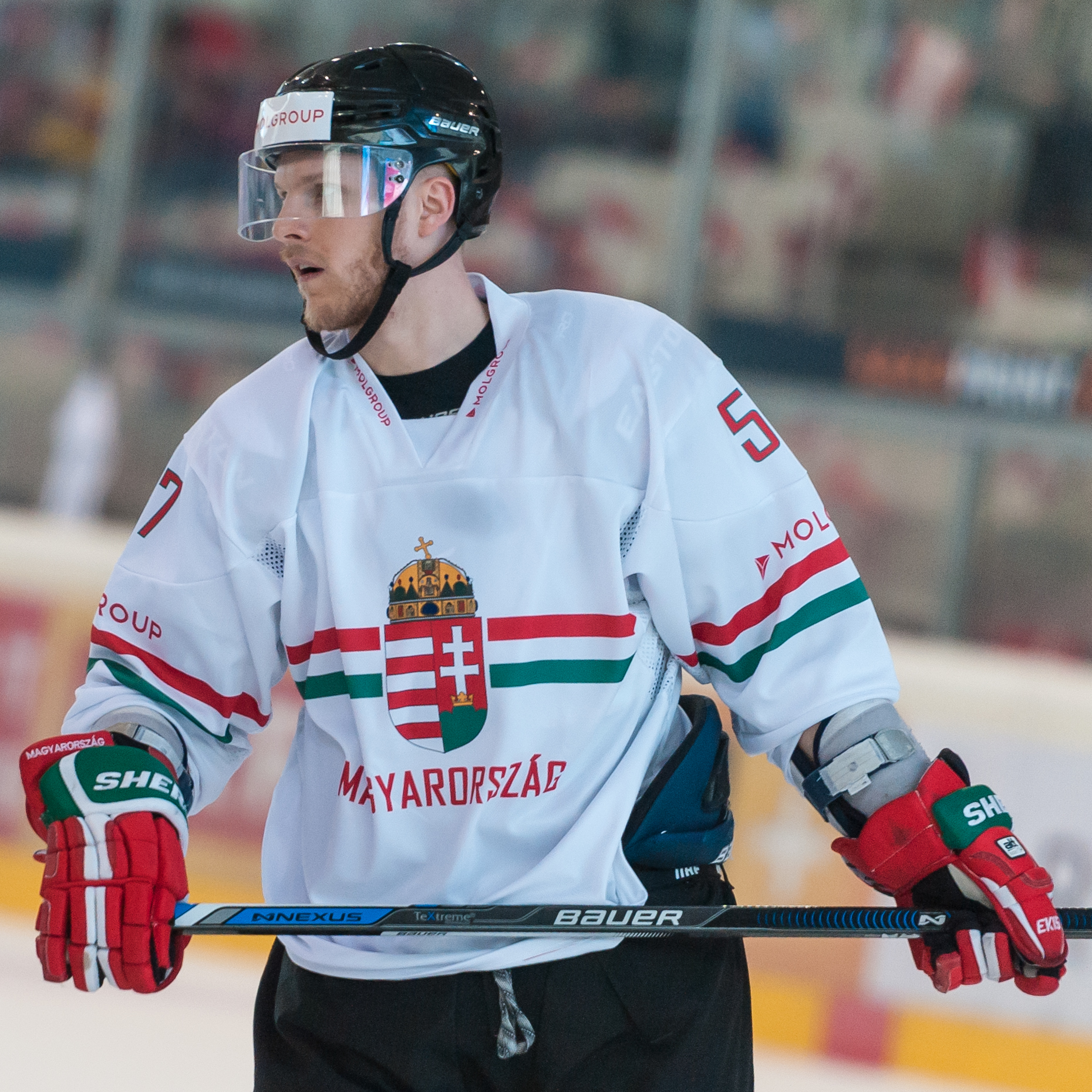 Freundschaftliches Eishockey-Laenderspiel - Oesterreich vs Ungarn. Bild zeigt Attila Orban (HUN).